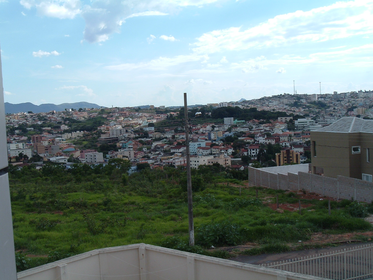 Lavras, MG., Brasil